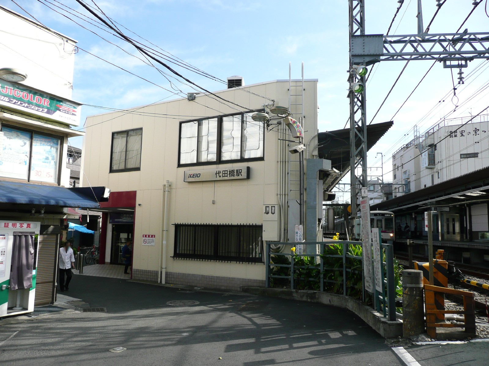 代田橋駅北口